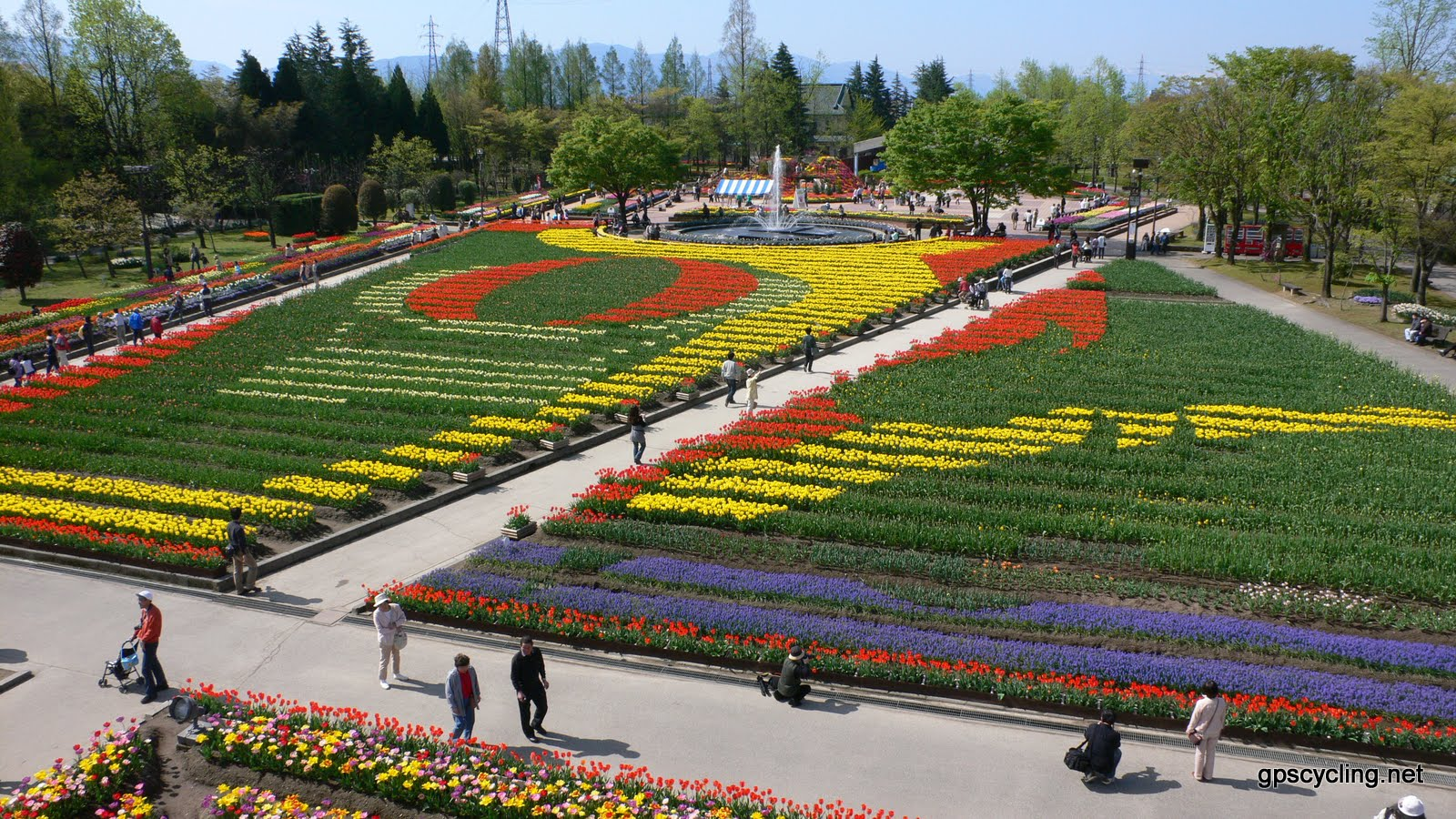 砺波チューリップ公園